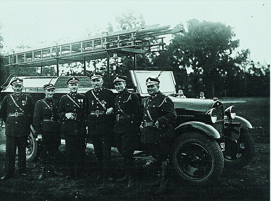 Stanisław Kochowicz jako prezes OSP w Gostyniu w otoczeniu strażaków, ok. 1939 r., autor nieznany.